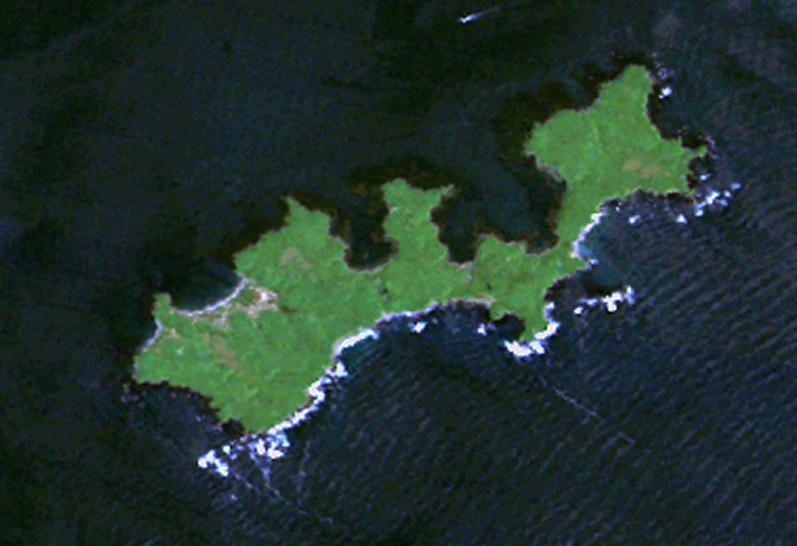 Yuri island in Habomai, Japan